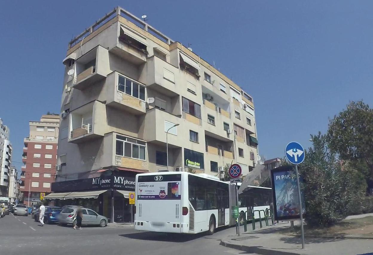 Rruga e Dibrës – building of Maks Velo